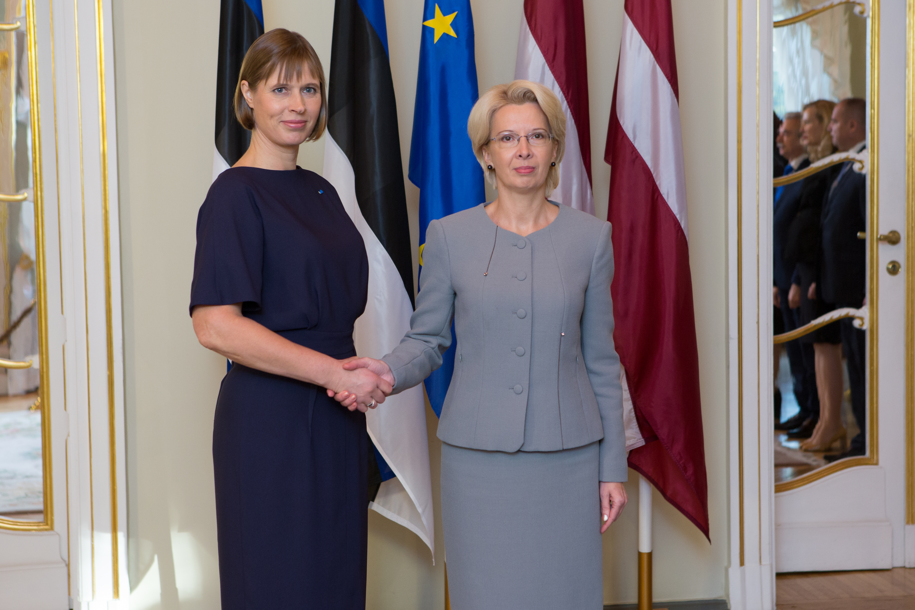 2016.gada 21.oktobris. Saeimas priekšsēdētāja Ināra Mūrniece tiekas ar Igaunijas Republikas prezidenti Kersti Kaljulaidu (Kersti Kaljulaid). Foto: Ernests Dinka, Saeimas Administrācija Izmantošanas noteikumi: saeima.lv/lv/autortiesibas